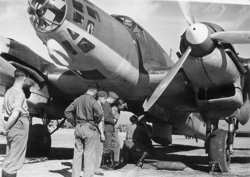 Title: Spanien, Flugzeug der Legion Condor Extra information: Spanien.- Beladung einer Heinkel He 111 E mit Bomben Factual corrections and alternative descriptions are encouraged separately from the original description. Additionally errors can be reported at this page to inform the Bundesarchiv. Original historic description: Zentralbild "Legion Condor" in Spanien Faschistische deutsche Interventionstruppen unterstützen den Francoputsch 1936 - 1939 gegen die demokratische Republik Spanien. UBz.: Auf dem Flugplatz Levida. Beim Einhängen der Bomben. C 0214/07/13 N